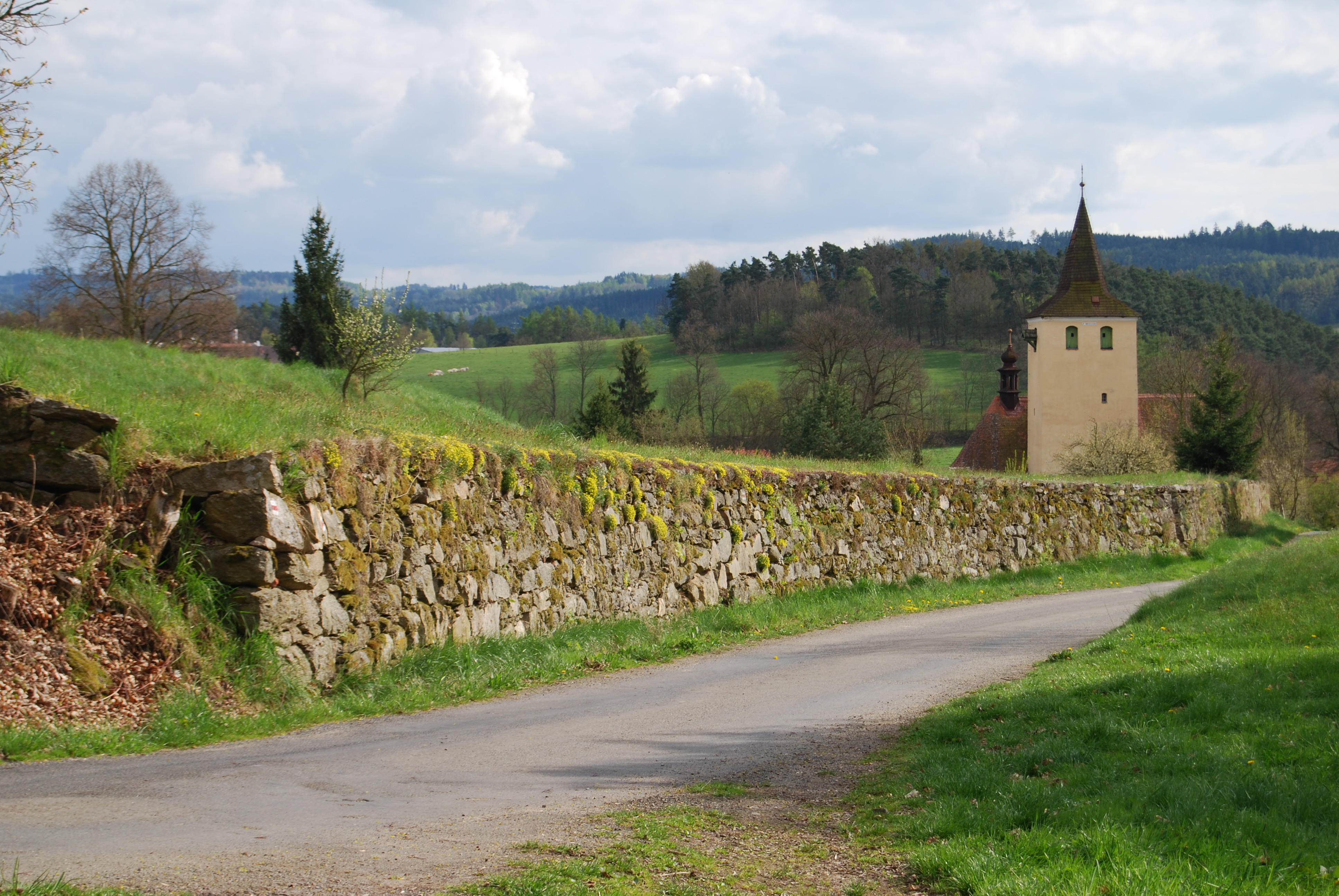 Jesenice (okres Příbram). Česká republika. - Google Maps - Google Earth